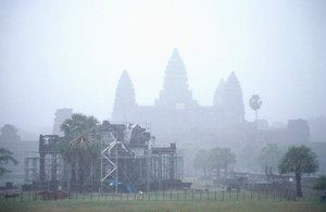 Morgenstimmung in Angkor Wat - von Oliver Spalt